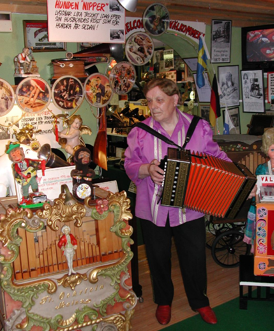 John "Frasse" Fransson demonstrerar ett självspelande dragspel. Fotograf: P Henning Bilden tagen i Juli 2005